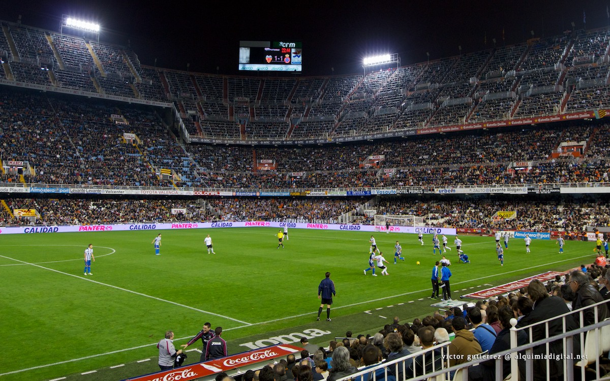 Valencia CF - Español 2012 #23